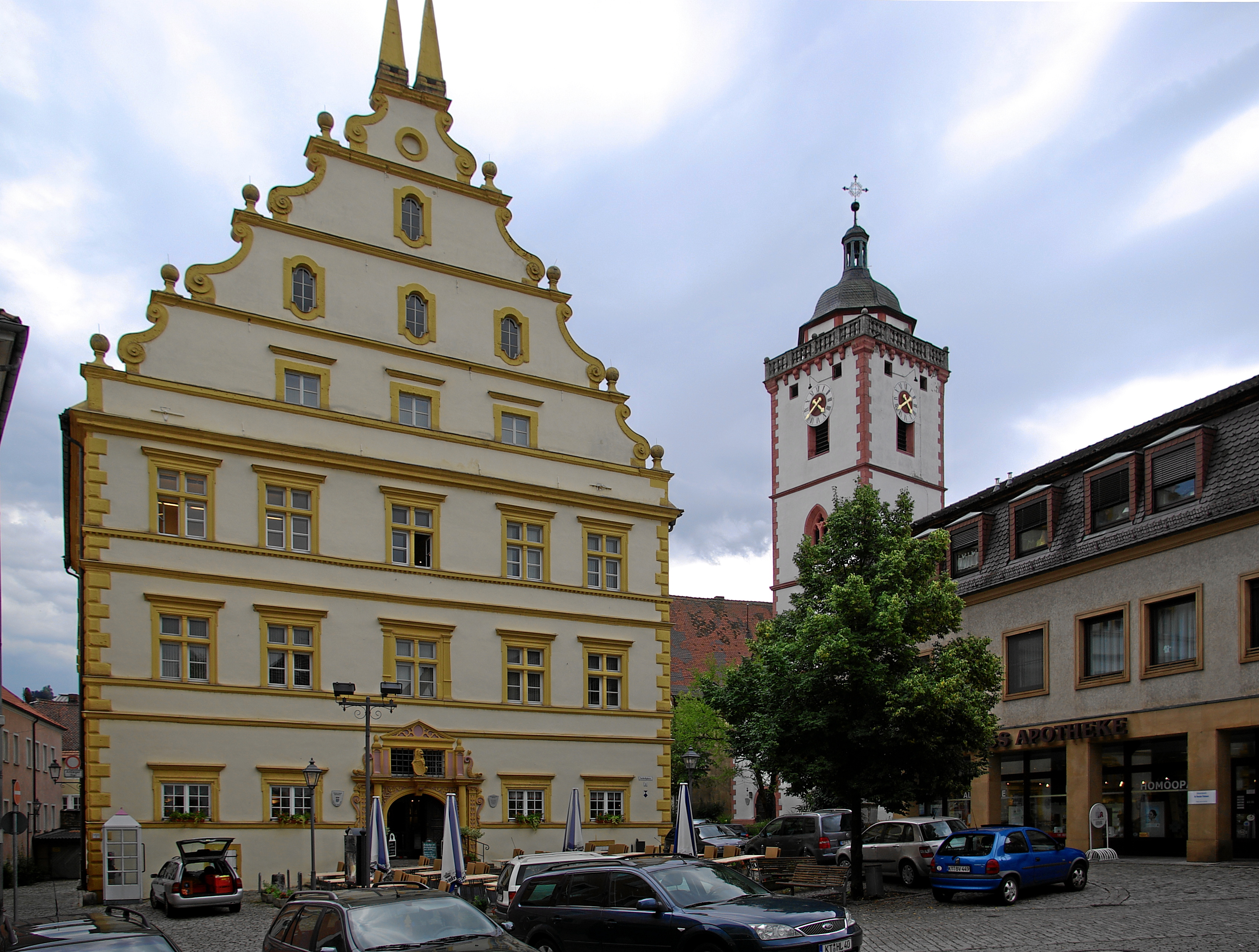 Marktbreit, Seinsheimsches Schloss und St. Nikolai